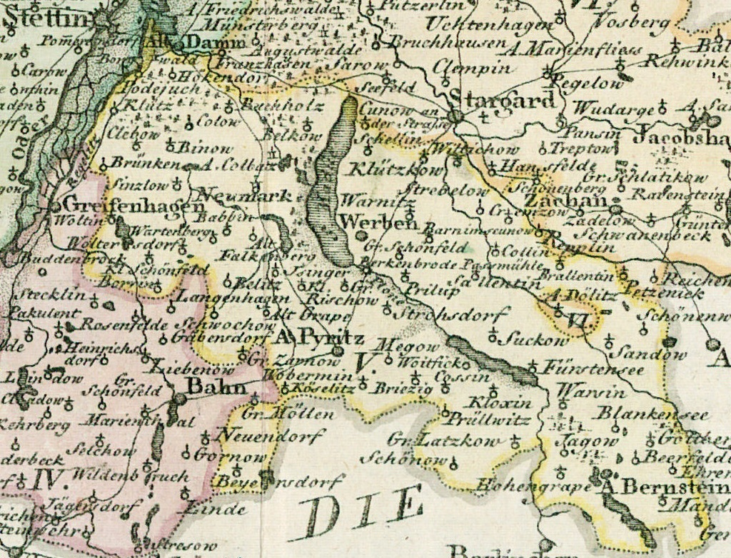 Ausschnitt aus "Landkarte des Herzogtums Vor- und Hinterpommern aus dem Jahr 1794"